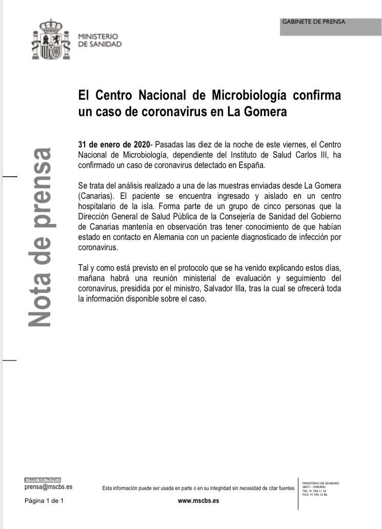 Report